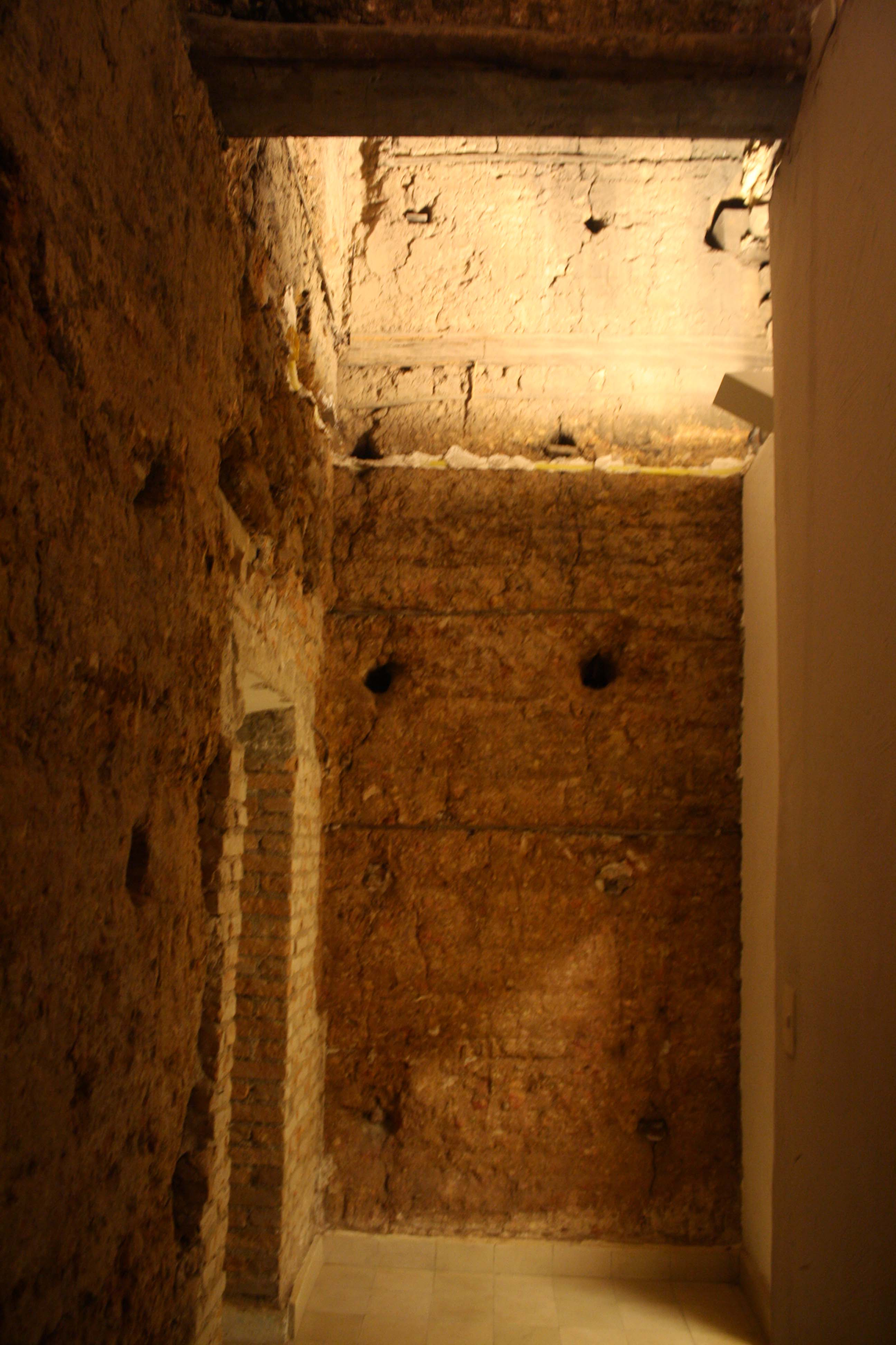 Detalhes da construção original da Igreja das Chagas do Seráfico Pai São Francisco, em São Paulo (SP), Brasil